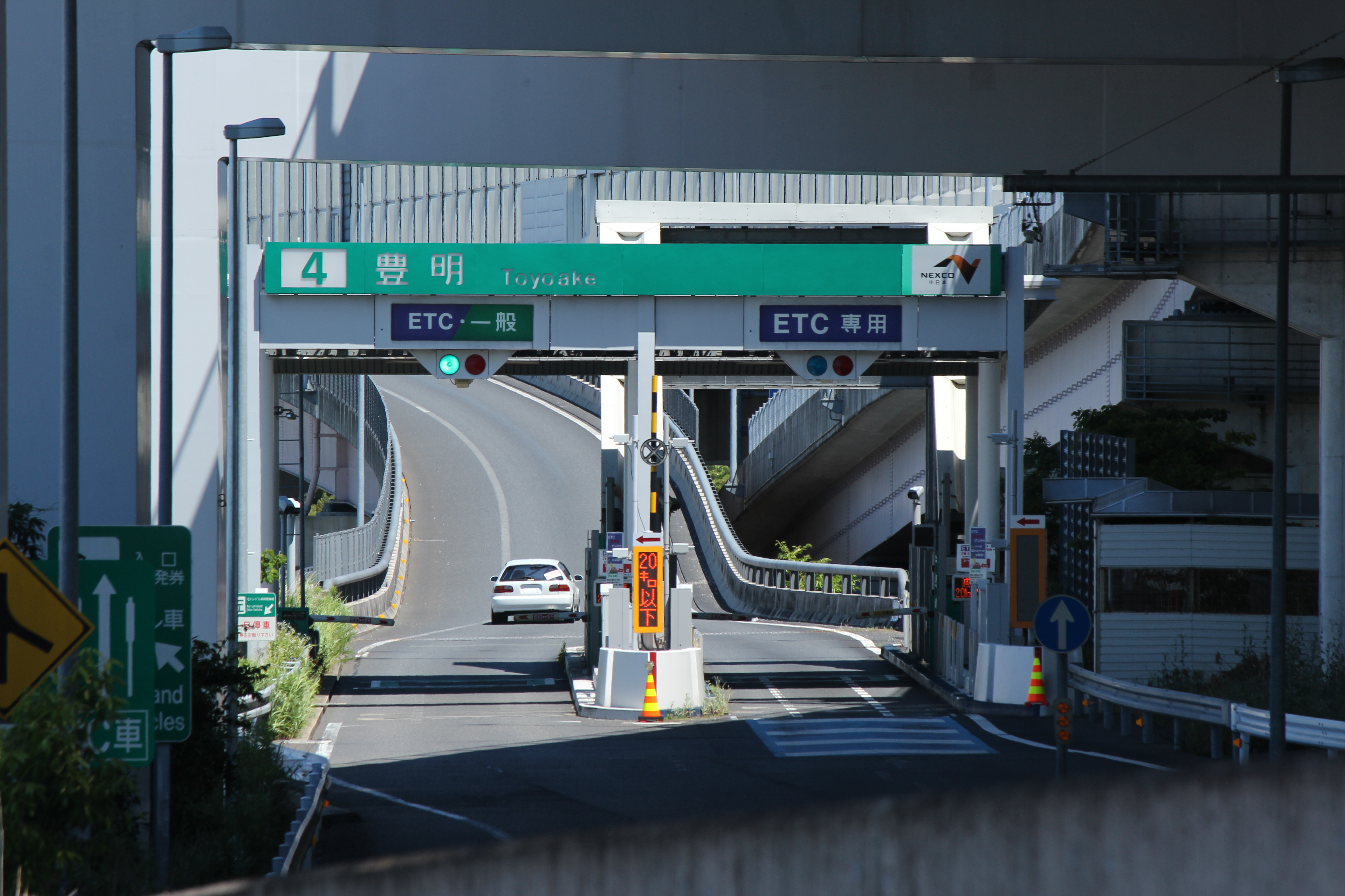 伊勢湾岸自動車道（第二東名）豊明IC豊田方面料金所